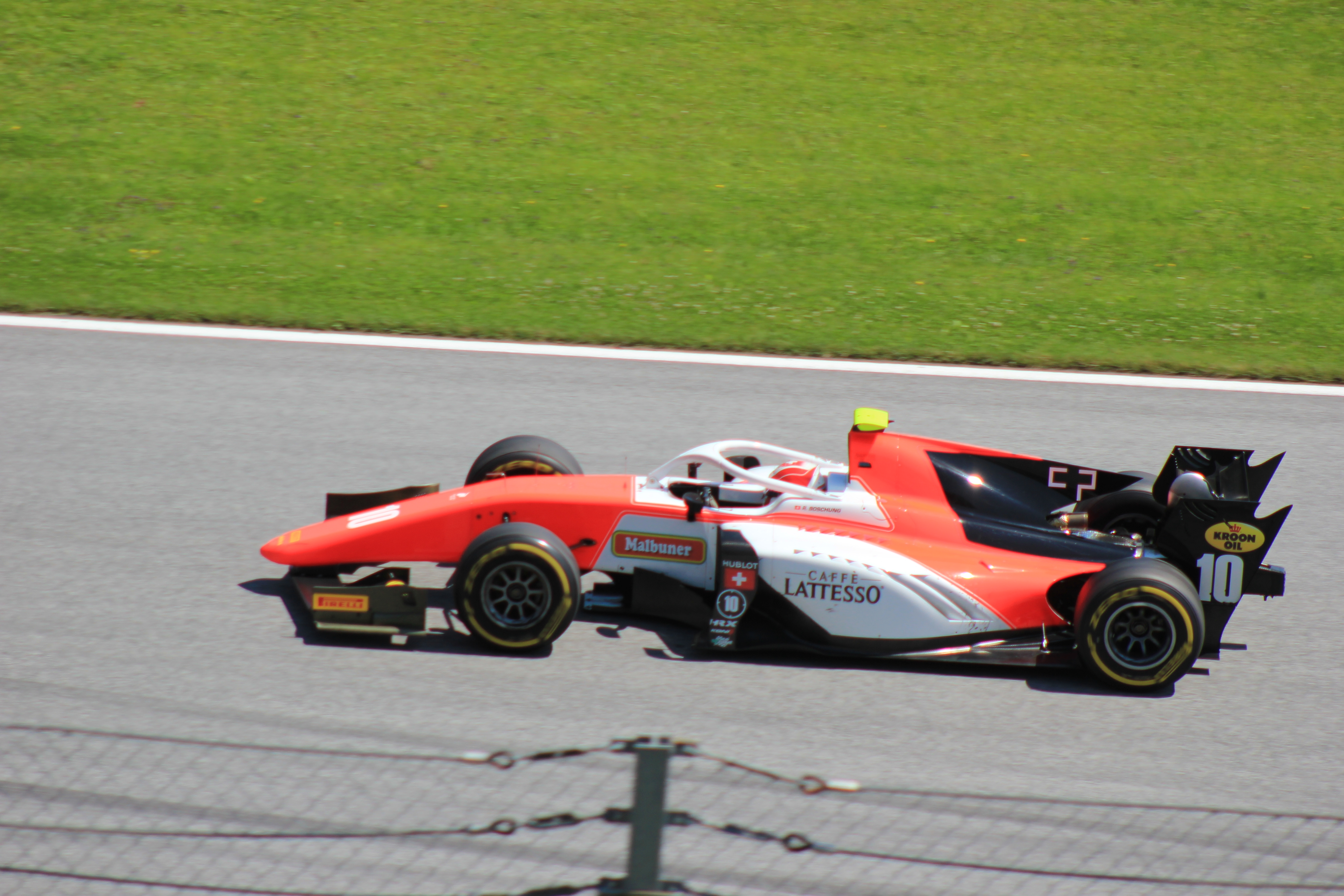 10 Ralph Boschung beim Rennwochenende in Österreich 2018 (2)